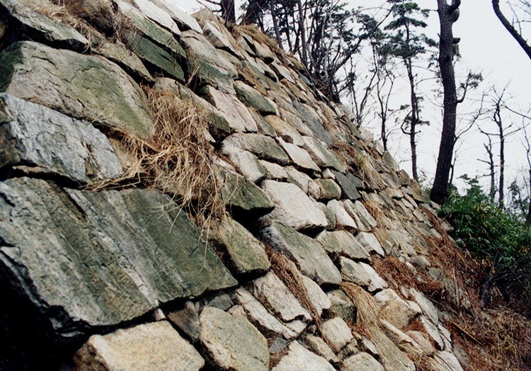 울산왜성의 성곽